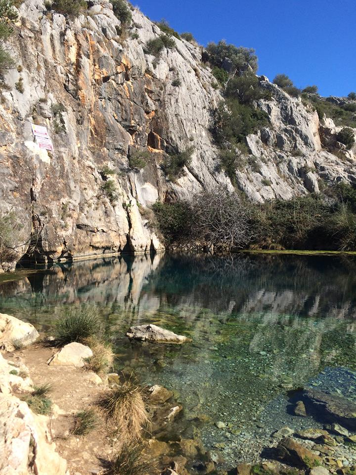 Una imatge de la Font d'Estramar